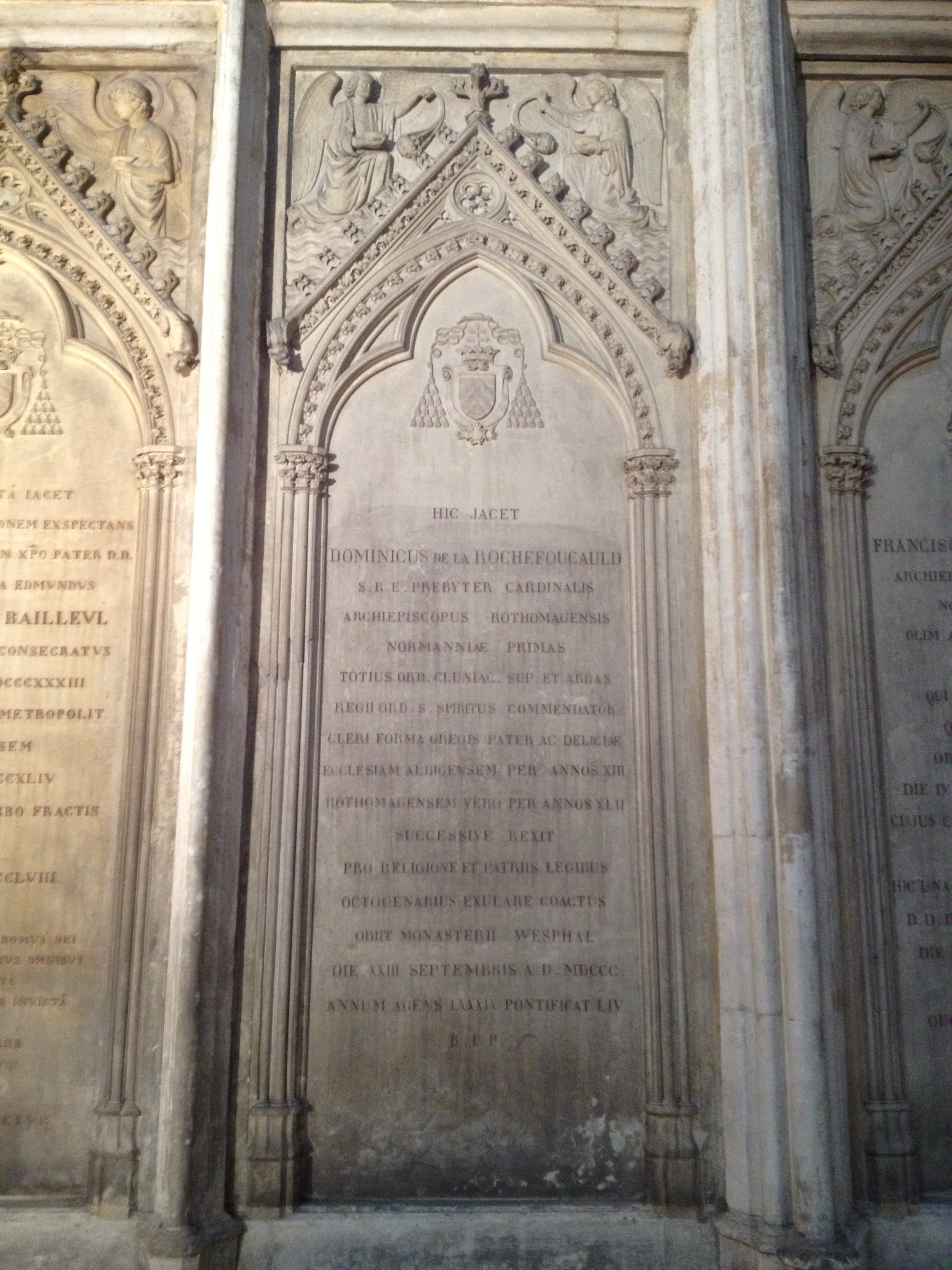 Plaque commémorative de Dominique de La Rochefoucauld.